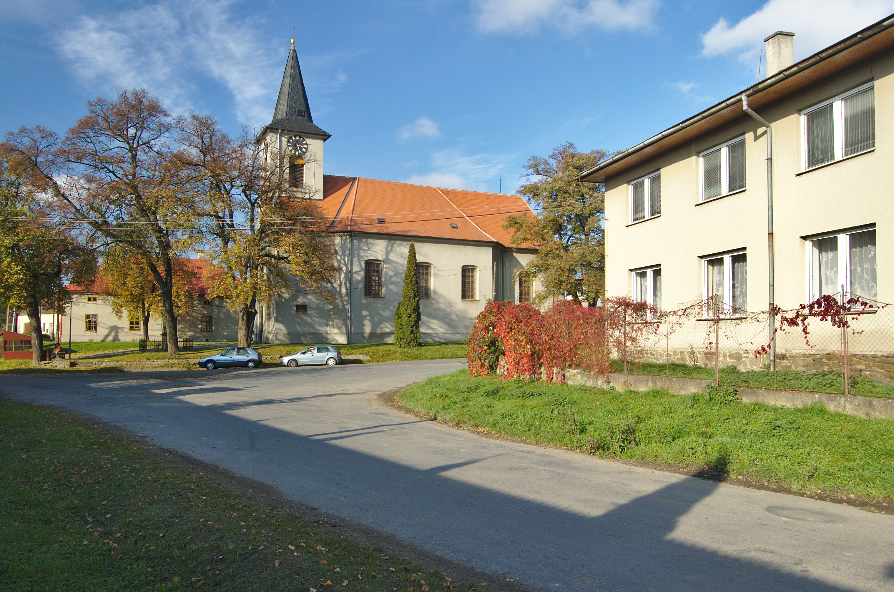 Kostel Zvěstování Panny Marie, Myslejovice, okres Prostějov